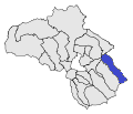 Mapa fet a partir d'un altre mapa de lliure disposició